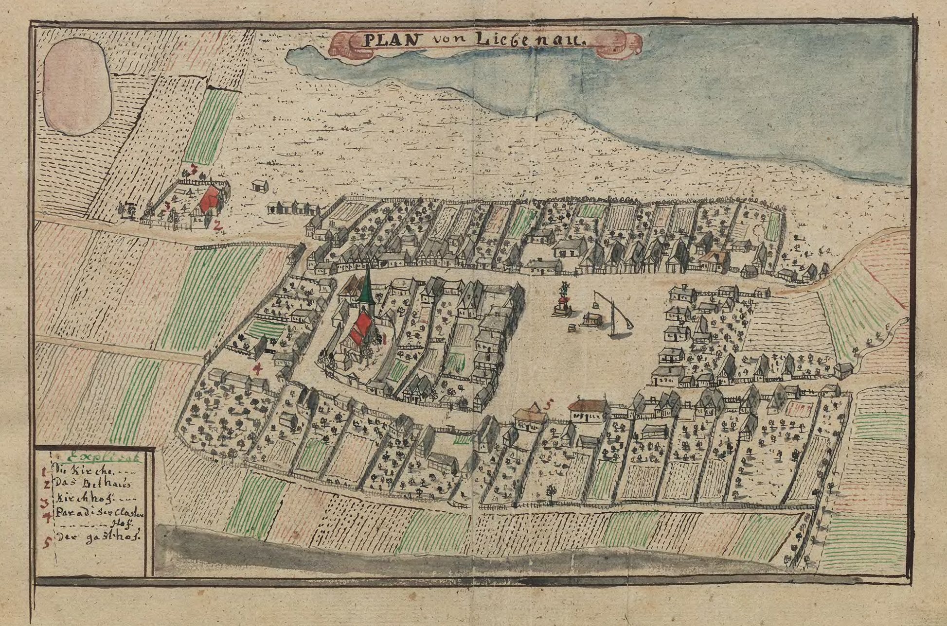 Widok miejscowości Lubrza